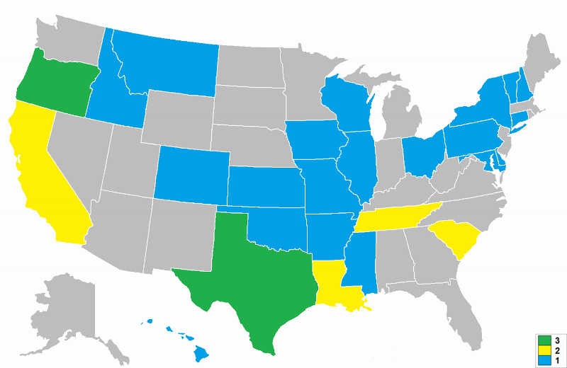 MissTeenUSATitles